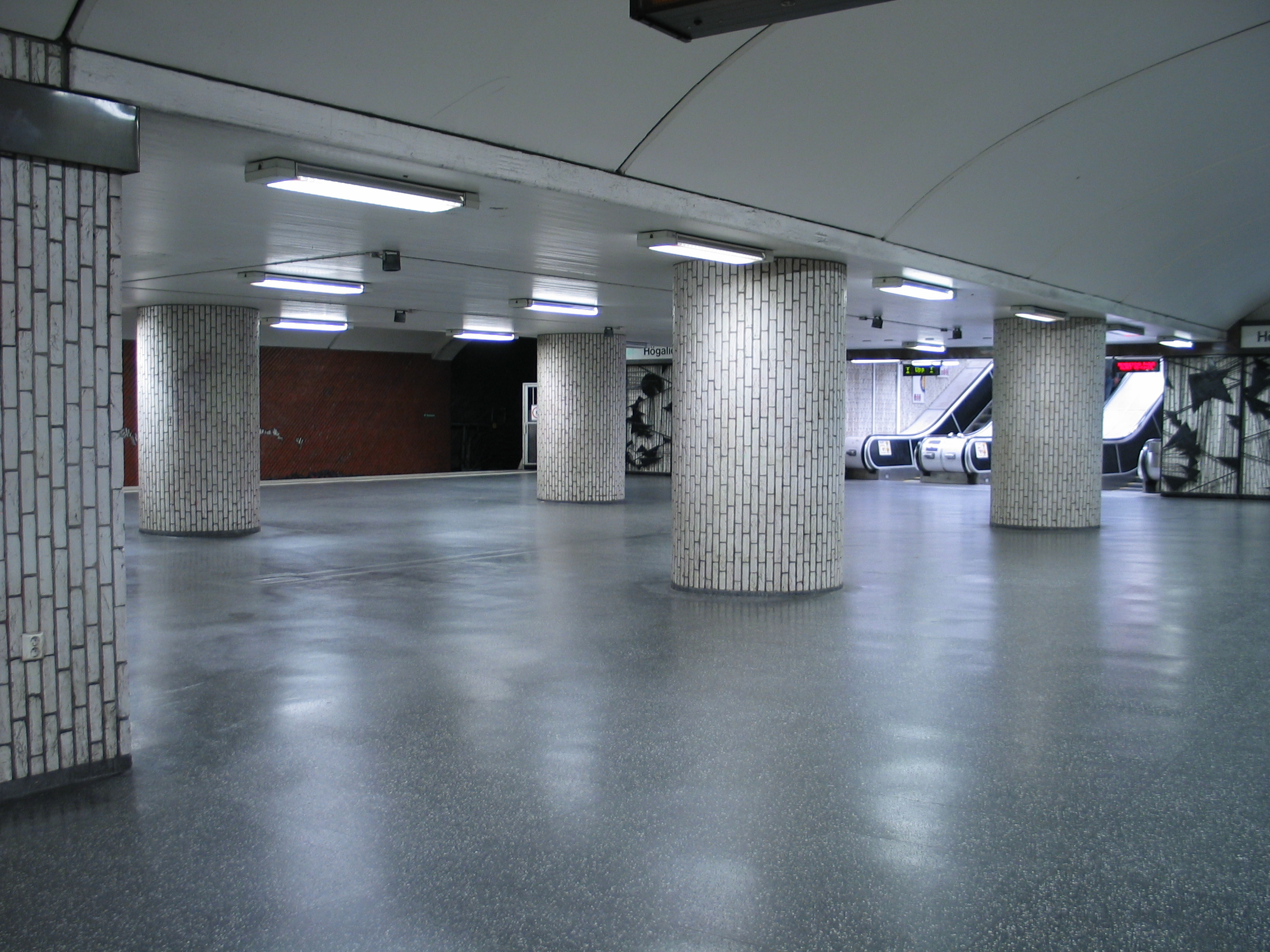 Hornstull, a metro station in Stockholm, Sweden.